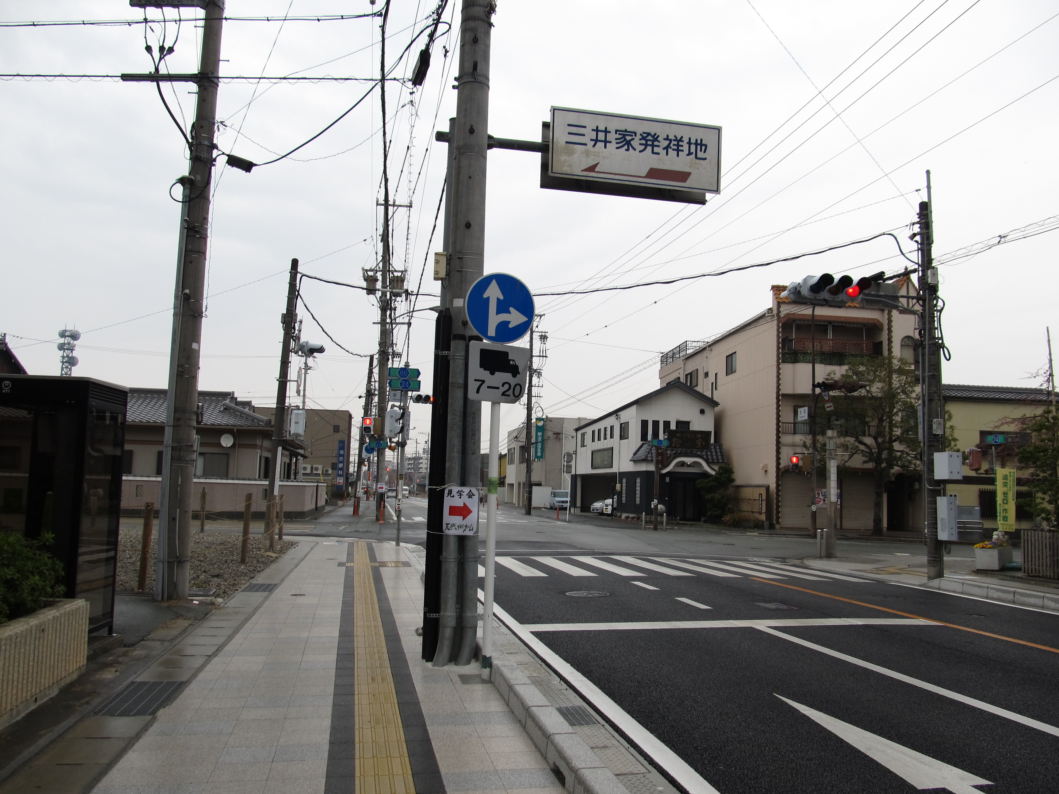 三重県松阪市にある本町交差点。県道24号松阪久居線と県道60号伊勢松阪線の交点であり、県道60号の終点である。 Canon PowerShot SX130 IS